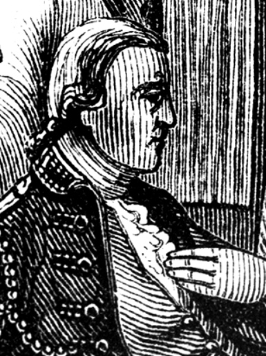 Johann Rall (1725-1776), hessischer Offizier